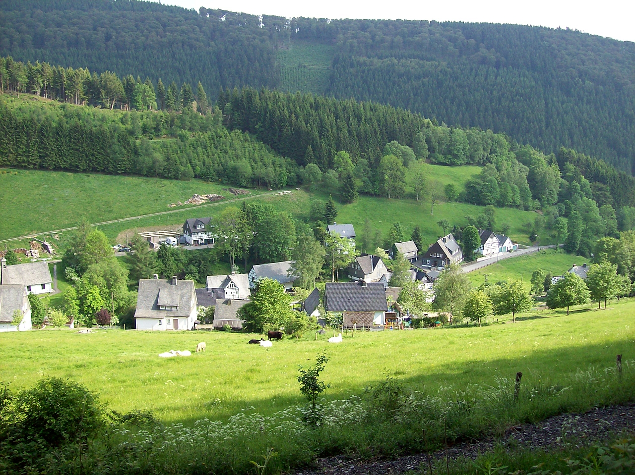 Schmallenberg- Lengenbeck (Germany)